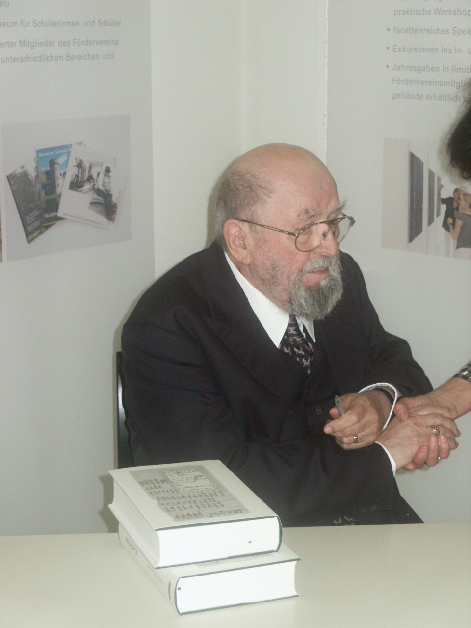 Franz Joseph van der Grinten - 04 oktober 2013 Signing his book Ausgewählte Gedichte (Selected Poems); published by Freundeskreis Museum Schloss Moyland e.V. at the occasion of his 80th birthday in 2013. FullSize